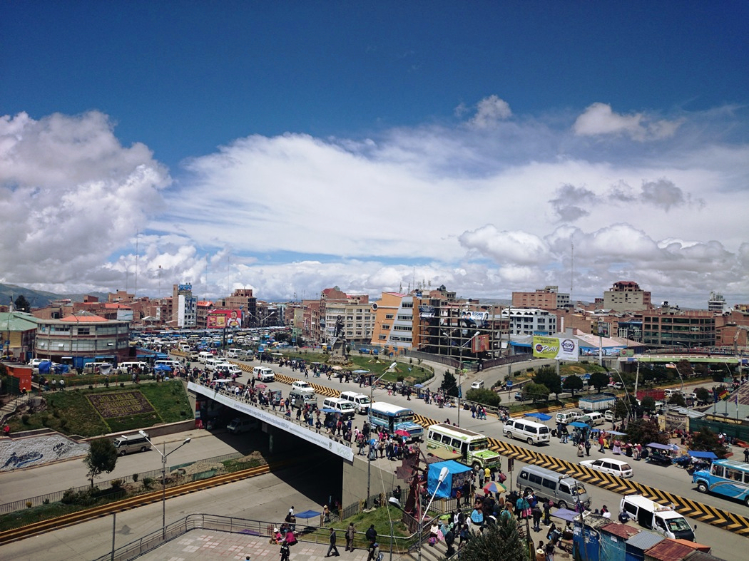 Vista de La Ceja de El Alto